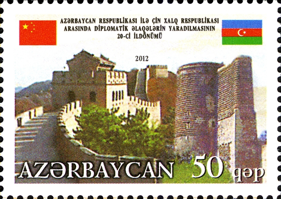 Azərbaycan Respublikası ilə Çin Xalq Respublikası arasında diplomatik əlaqələrin yaradılmasının 20-ci ildönümünə həsr olunmuş marka.